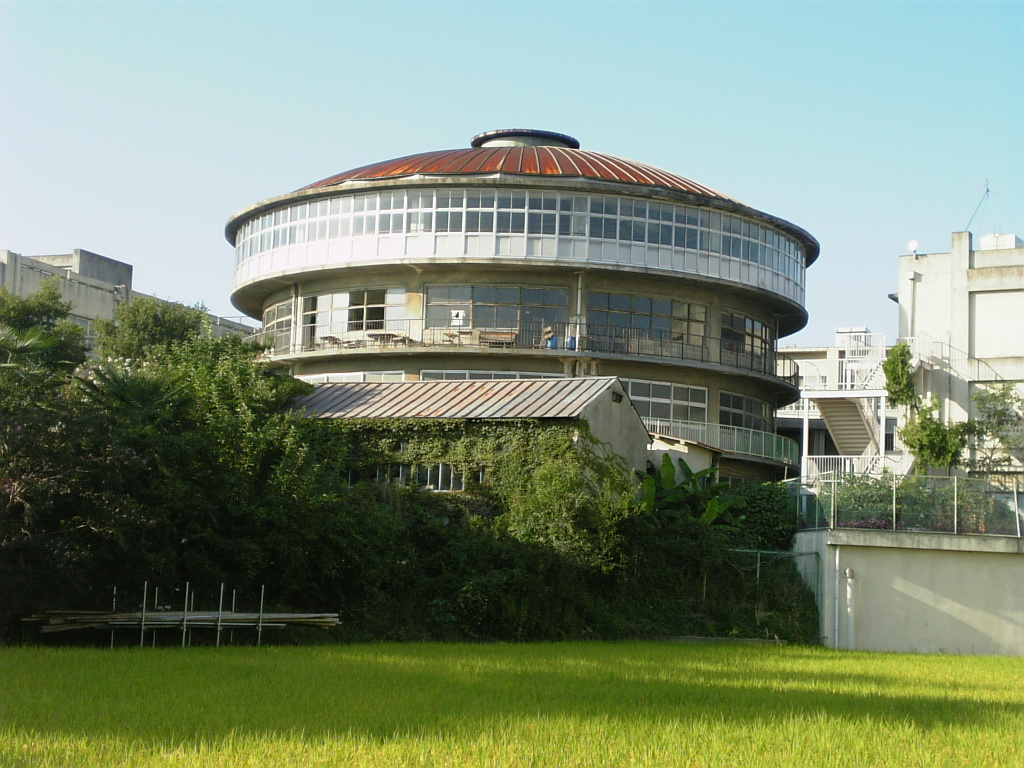 羽曳野市立誉田中学校の円形校舎